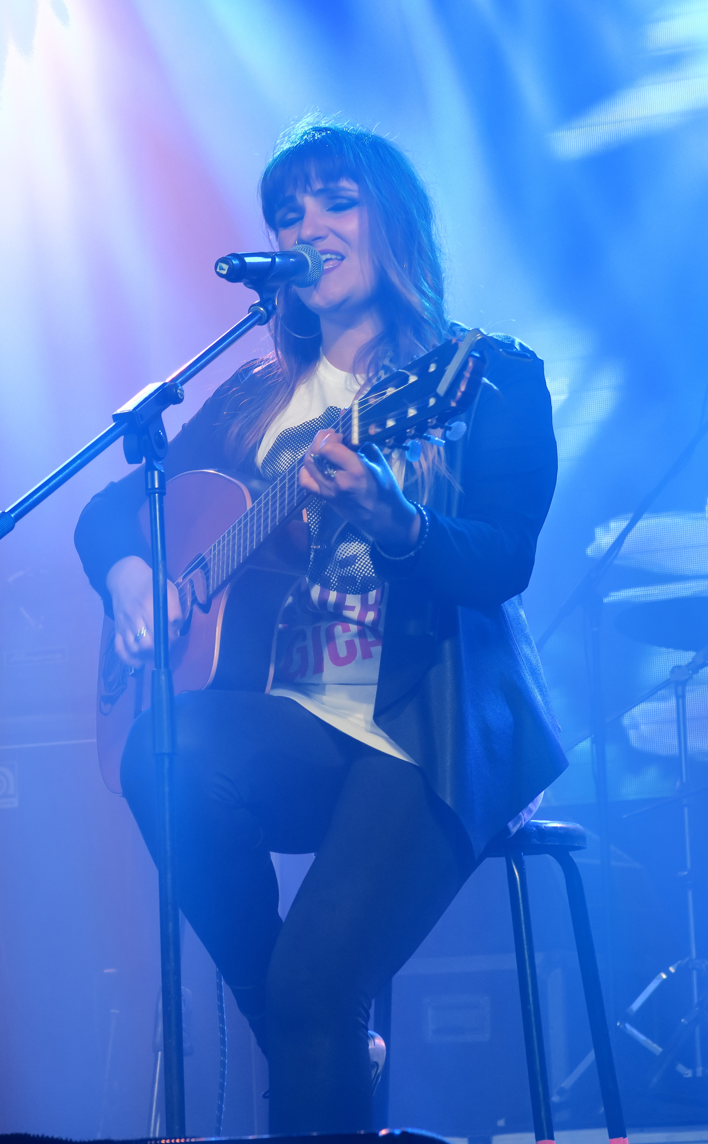 Rozalén, Concierto Enérgicas de Greenpeace, Mujeres en Concierto por la Revolución Energética, Sala la Riviera, Madrid 2018